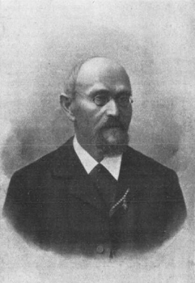 Karel Dimmer (1825-1909), rakouský a český politik